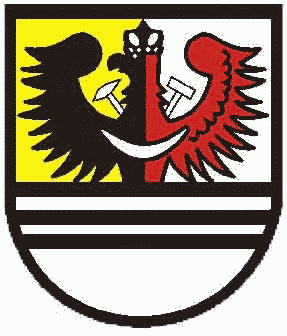 Herb wsi Srebrna Góra.